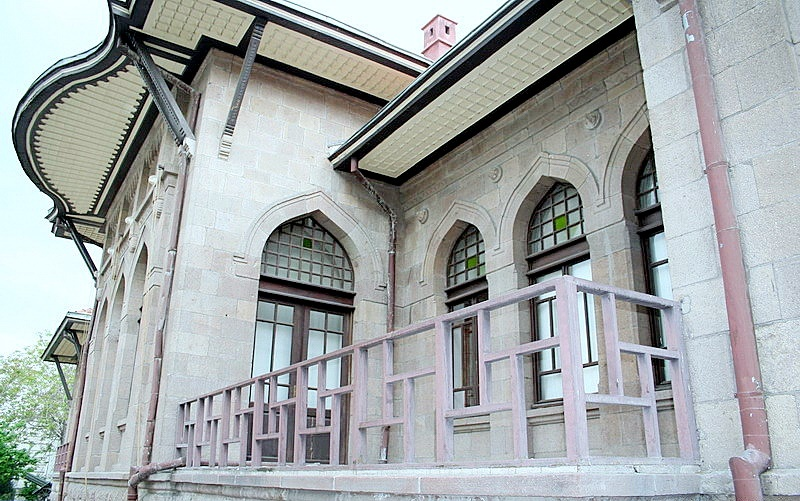 Ankara Kurtuluş Savaşı Müzesi - TBMM I. Binası